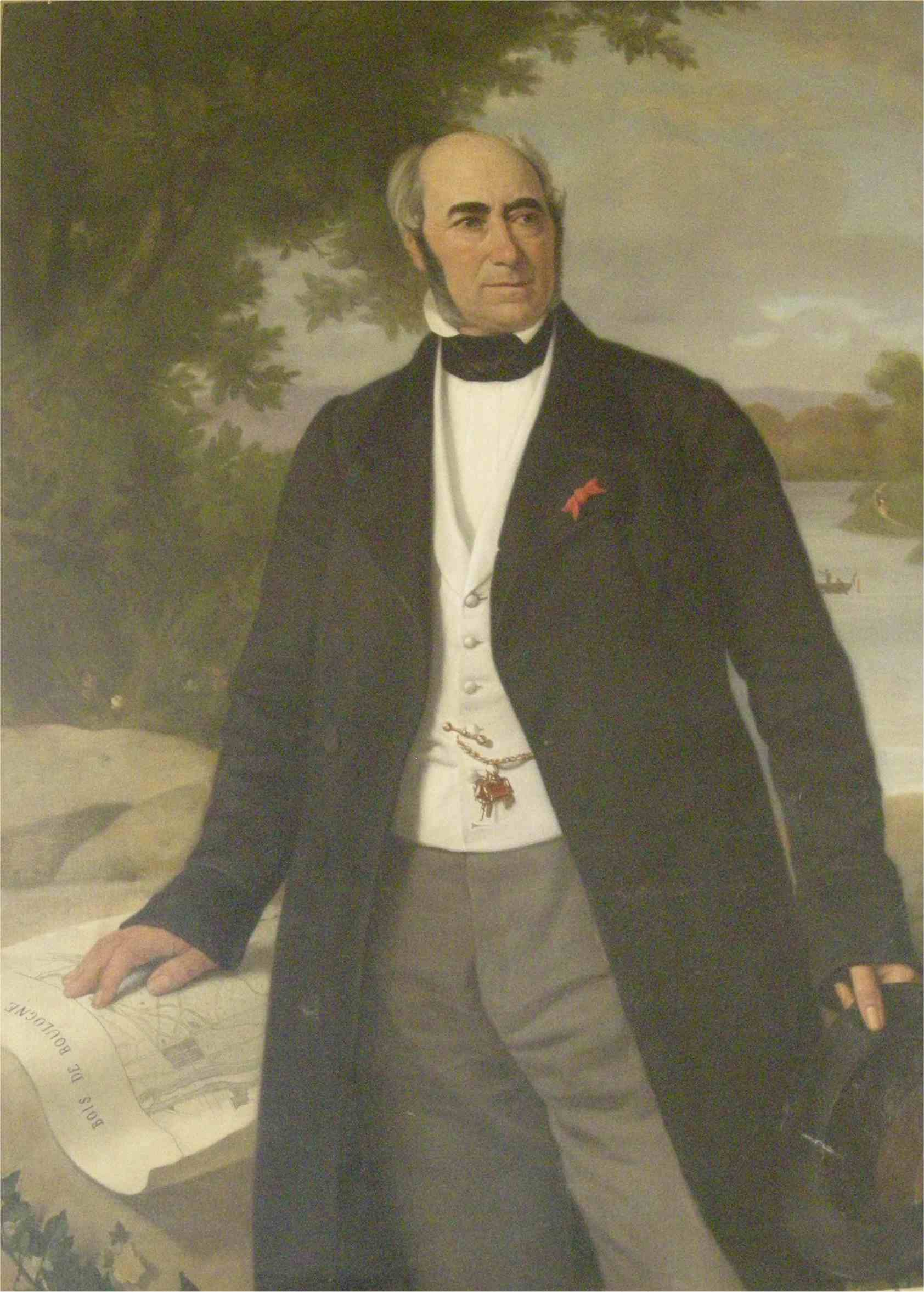 Portrait de Louis-Sulpice Varé (1803- 1883)